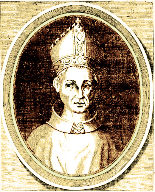 Cardinal Jean de Cros